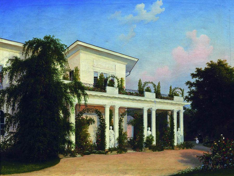 Усадьба. Качановка. 1849. Холст, масло. 54 x 71. Сумский художественный музей